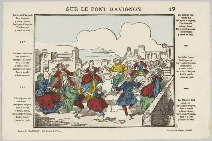 Sur le pont d'Avignon, lithographie coloriée, papier (matière)